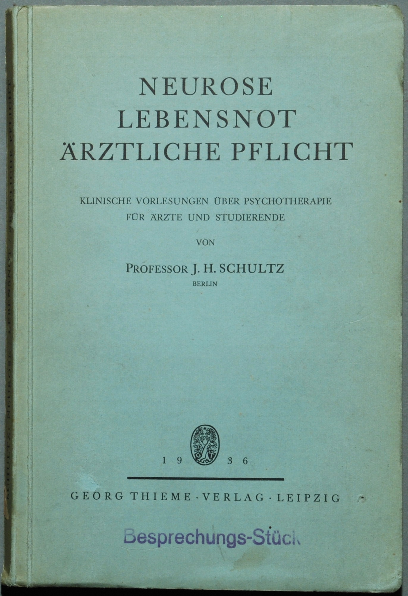 Schultz, J.[ohann] H.[einrich]: Neurose, Lebensnot, ärztliche Pflicht. Vorlesungen über Psychotherapie für Ärzte und Studierende. Leipzig: G. Thieme 1936, 125 Seiten + 1 Blatt Verlagsanzeigen. 1.Auflage, Original-Pappband 8°.